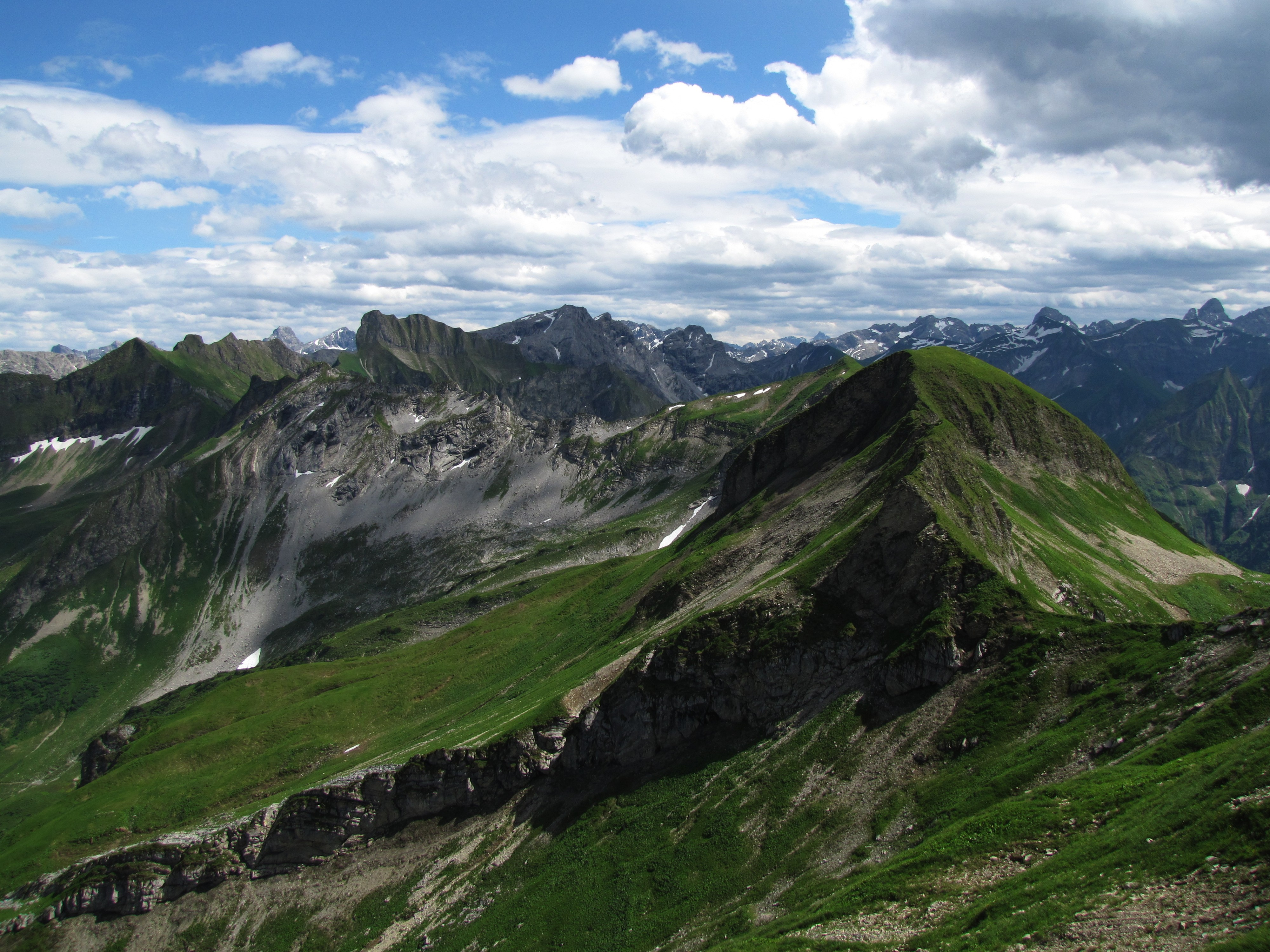 Blick vom Großen Seekopf nach Südosten zum Kleinen Seekopf (2096 m) und dem Lachenkopf (2111 m).